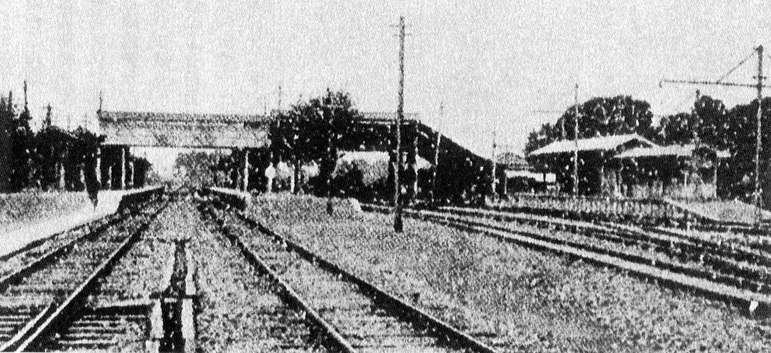 左は国鉄滑川駅、右は立山軽便鉄道滑川駅。